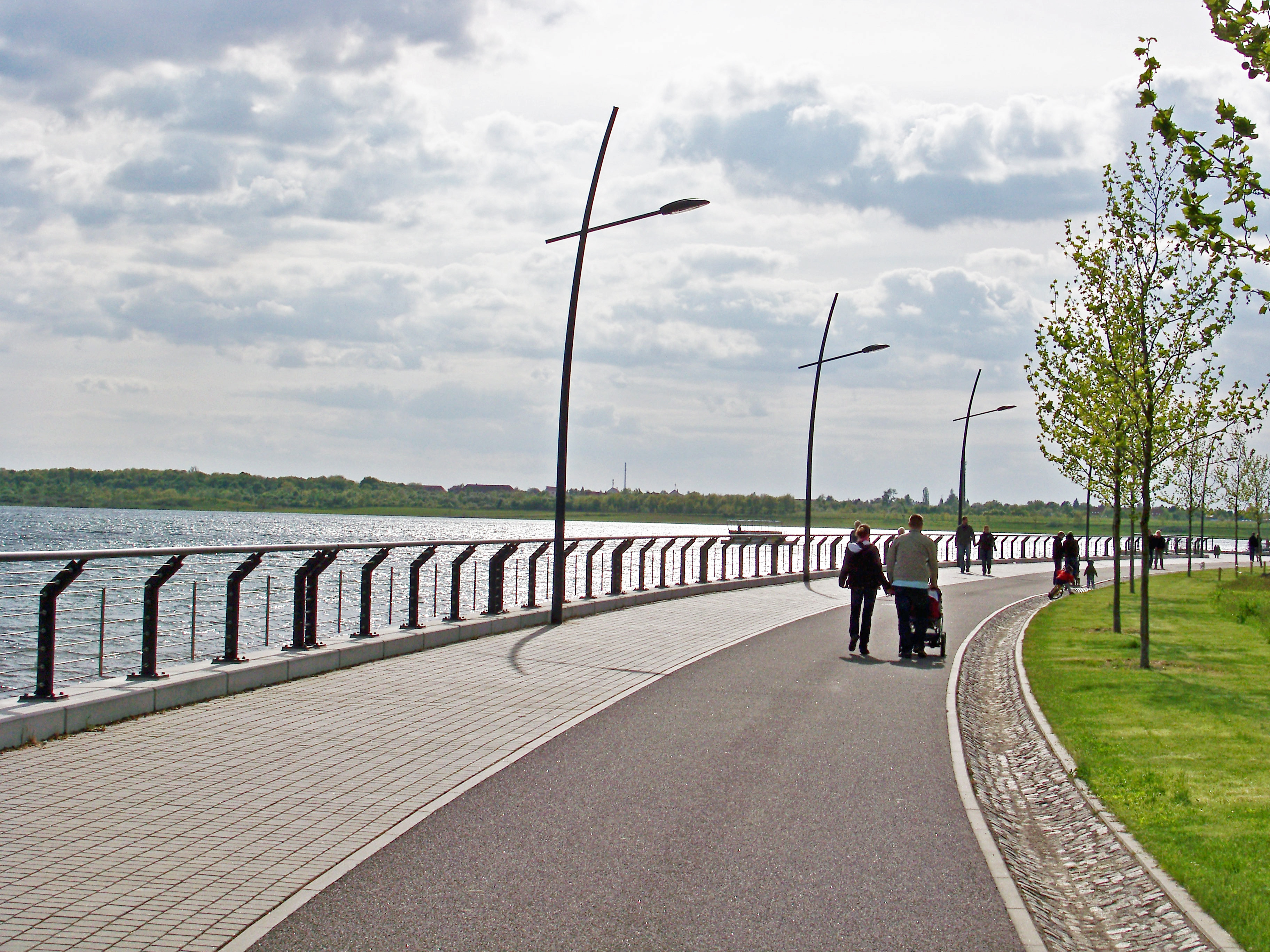 Seepromenade am nördlichen Ufer des Markkleeberger Sees südlich von Leipzig, Deutschland